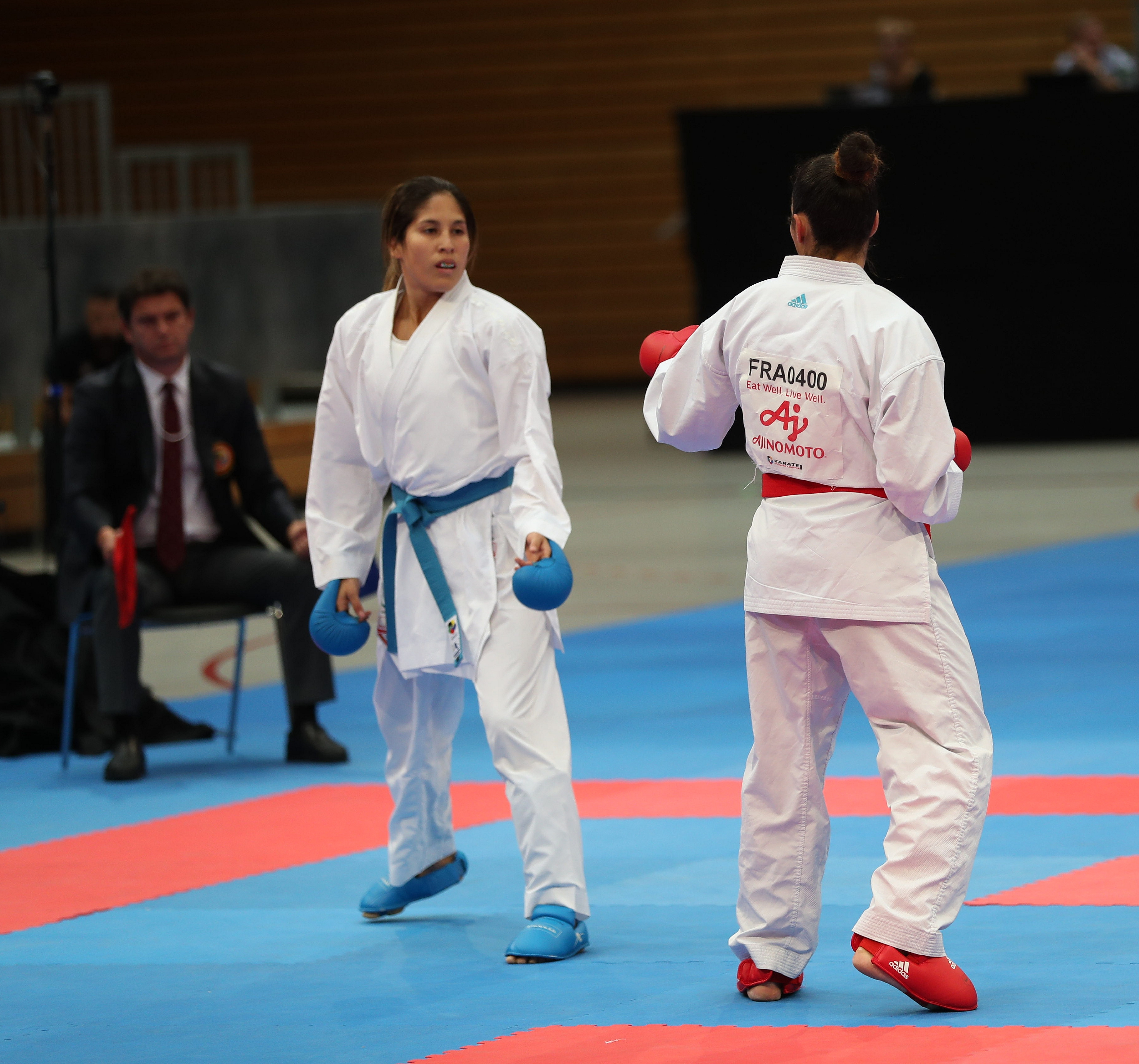 Female Kumite –61 kg am 16. September 2018 in der Karate1 Premier League Berlin 2018. Abgebildet: Alexandra Grande. Leila Heurtault.